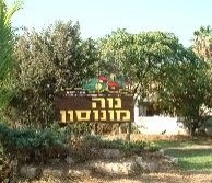 הכניסה הדרומית לנוה מונוסון